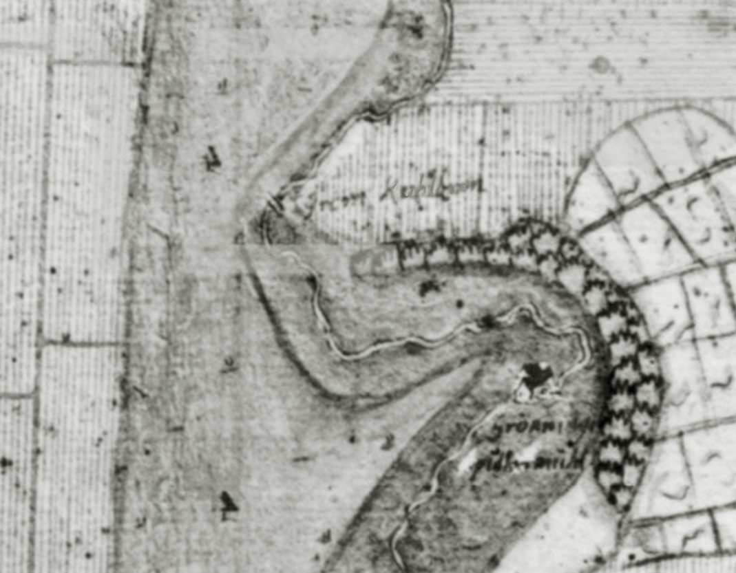 Grüninger Pulvermühle im Glemstal und Kleinmühlen-Standorte im Gewann Kühlenbronn (1682)